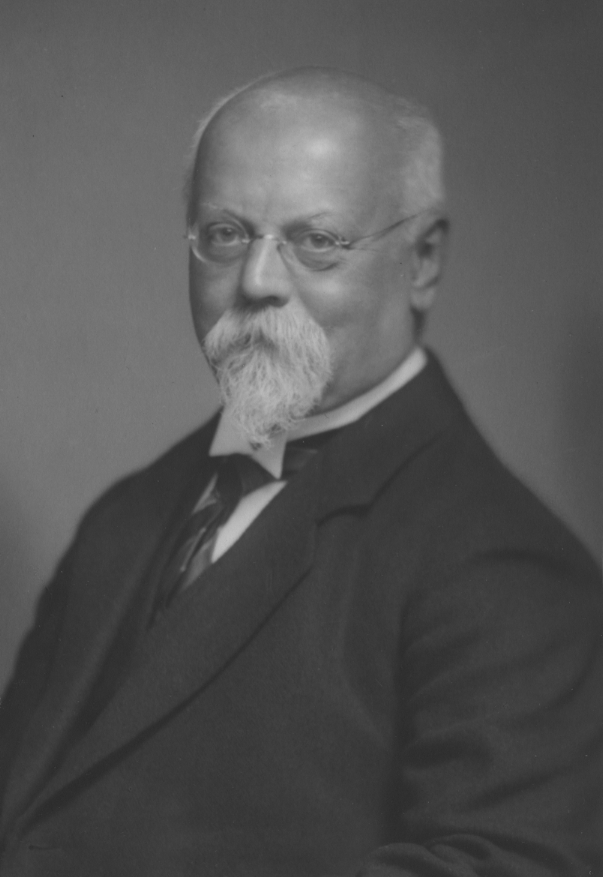 Carl Schilling (1857–1932), Pädagoge. Altersbild